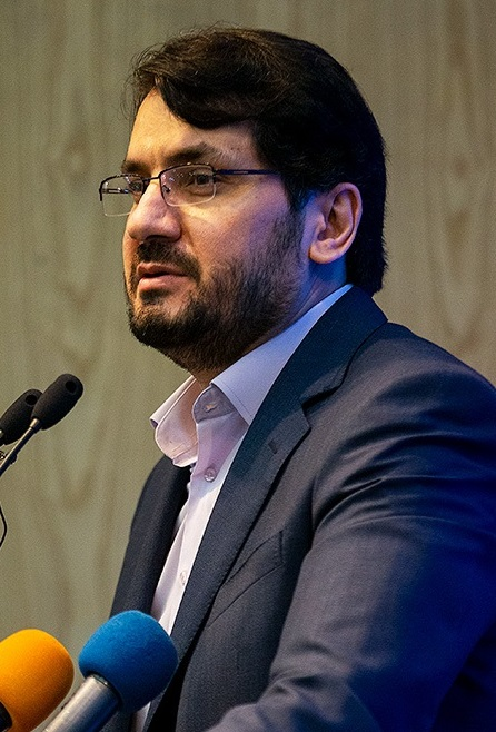 تکریم و معارفهٔ رئیس کل و دادستان دیوان محاسبات - مرداد ۱۳۹۹